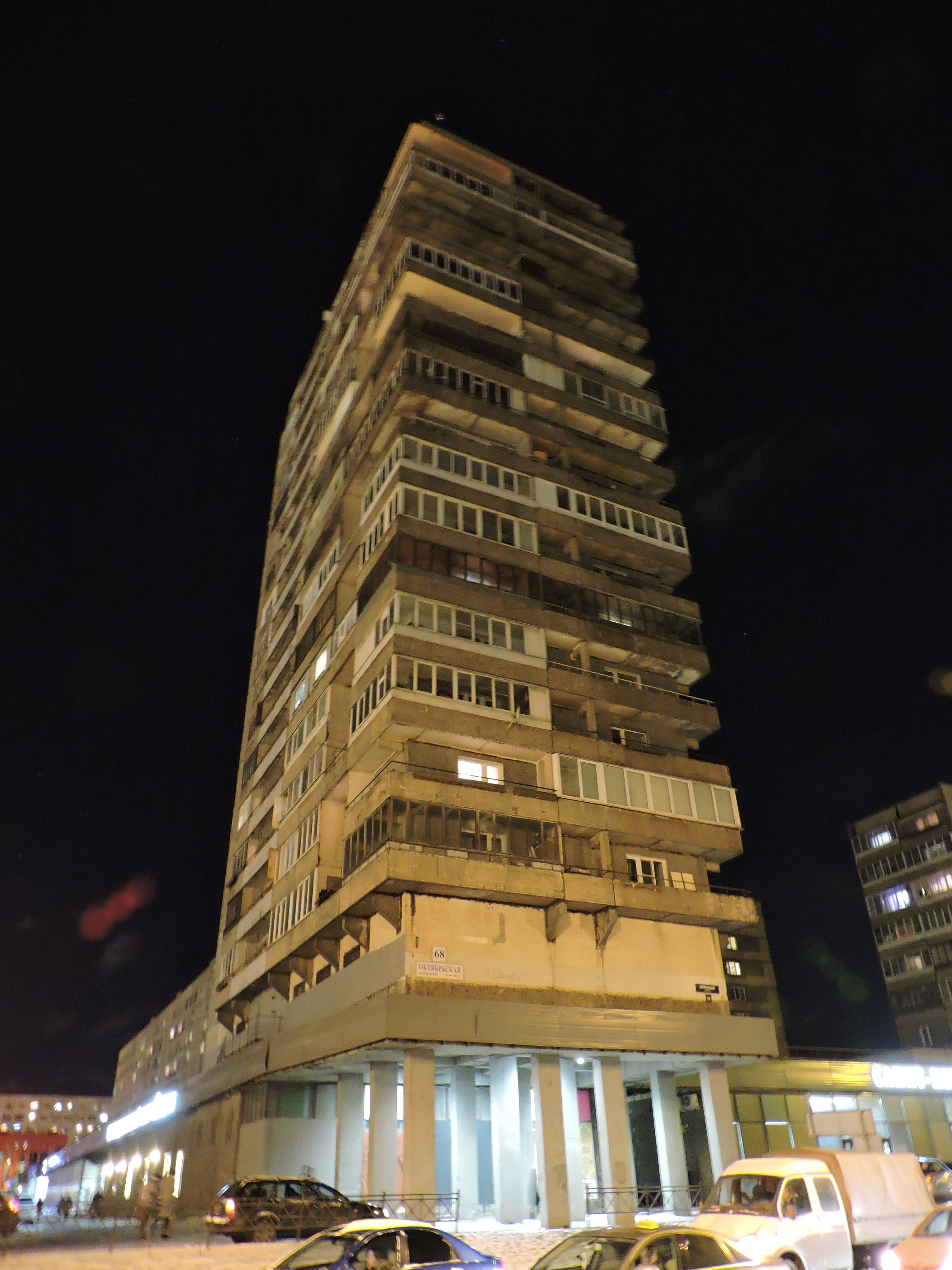 Южная башня на Октябрьской набережной